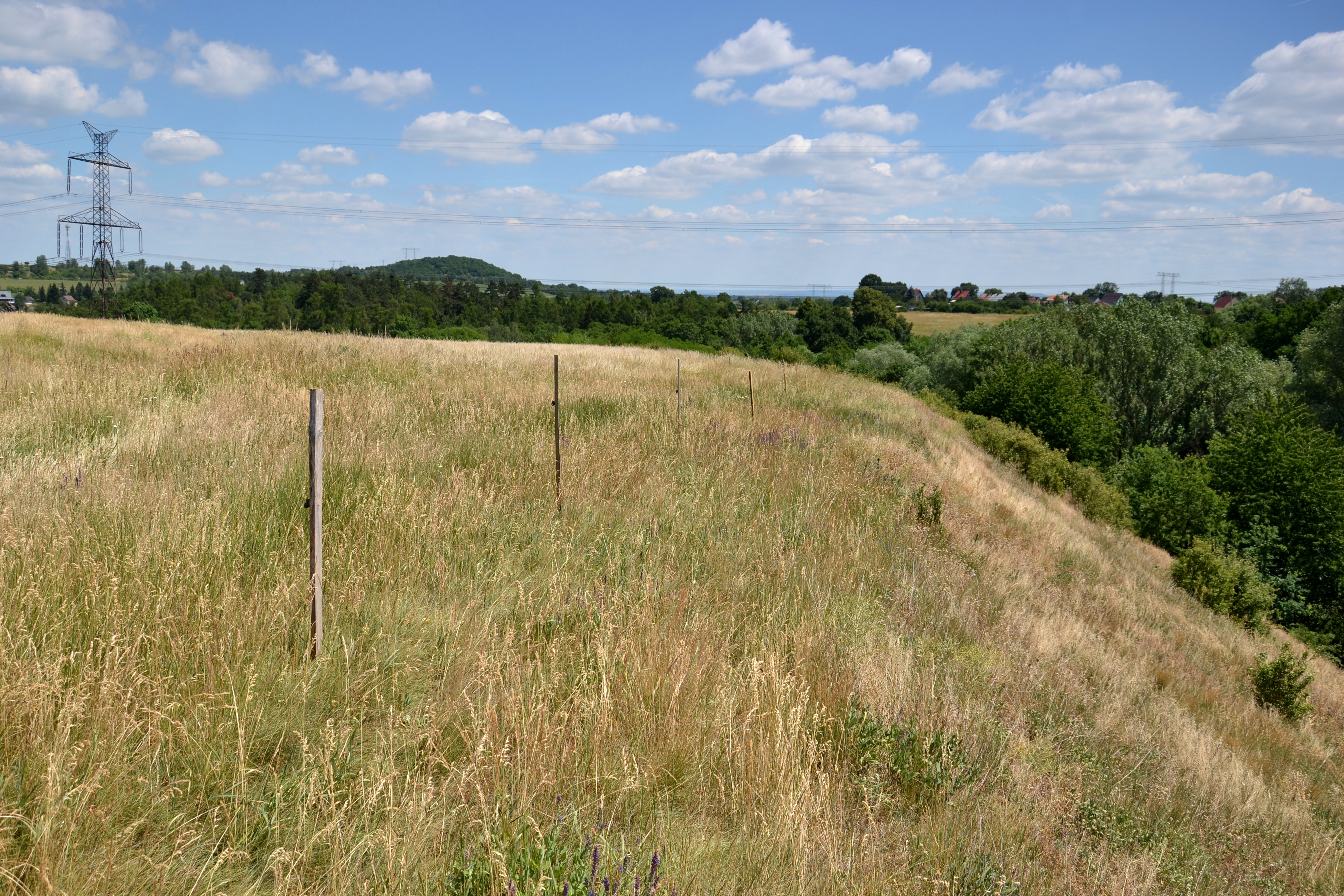 Hradec u Kadaně – jižní svah akropole